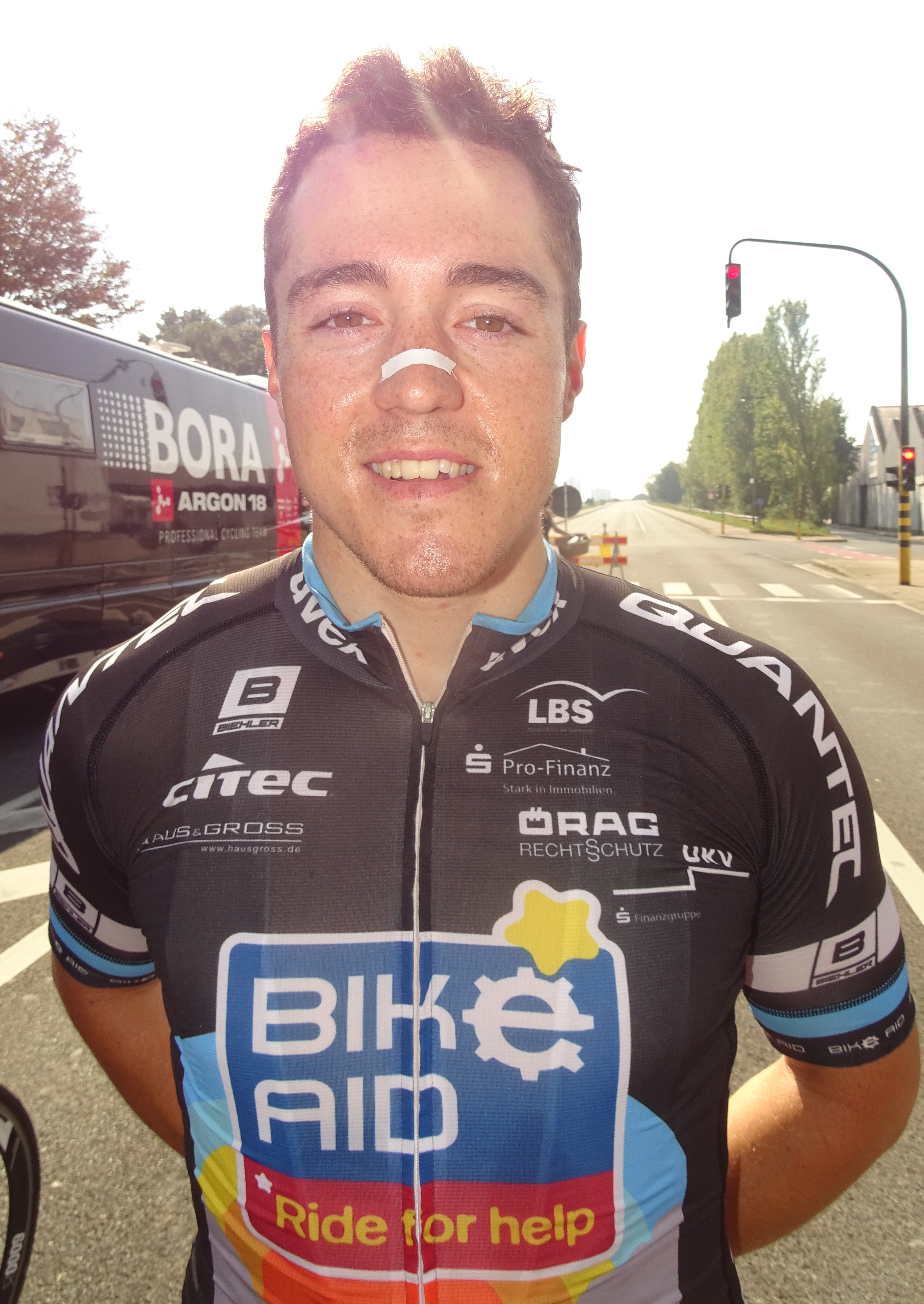 Reportage réalisé le dimanche 30 août à l'occasion du départ et de l'arrivée de la Coupe Sels 2015 à Merksem (Anvers), Belgique.